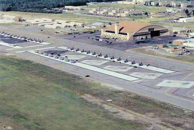 Eielson AFB Flightline